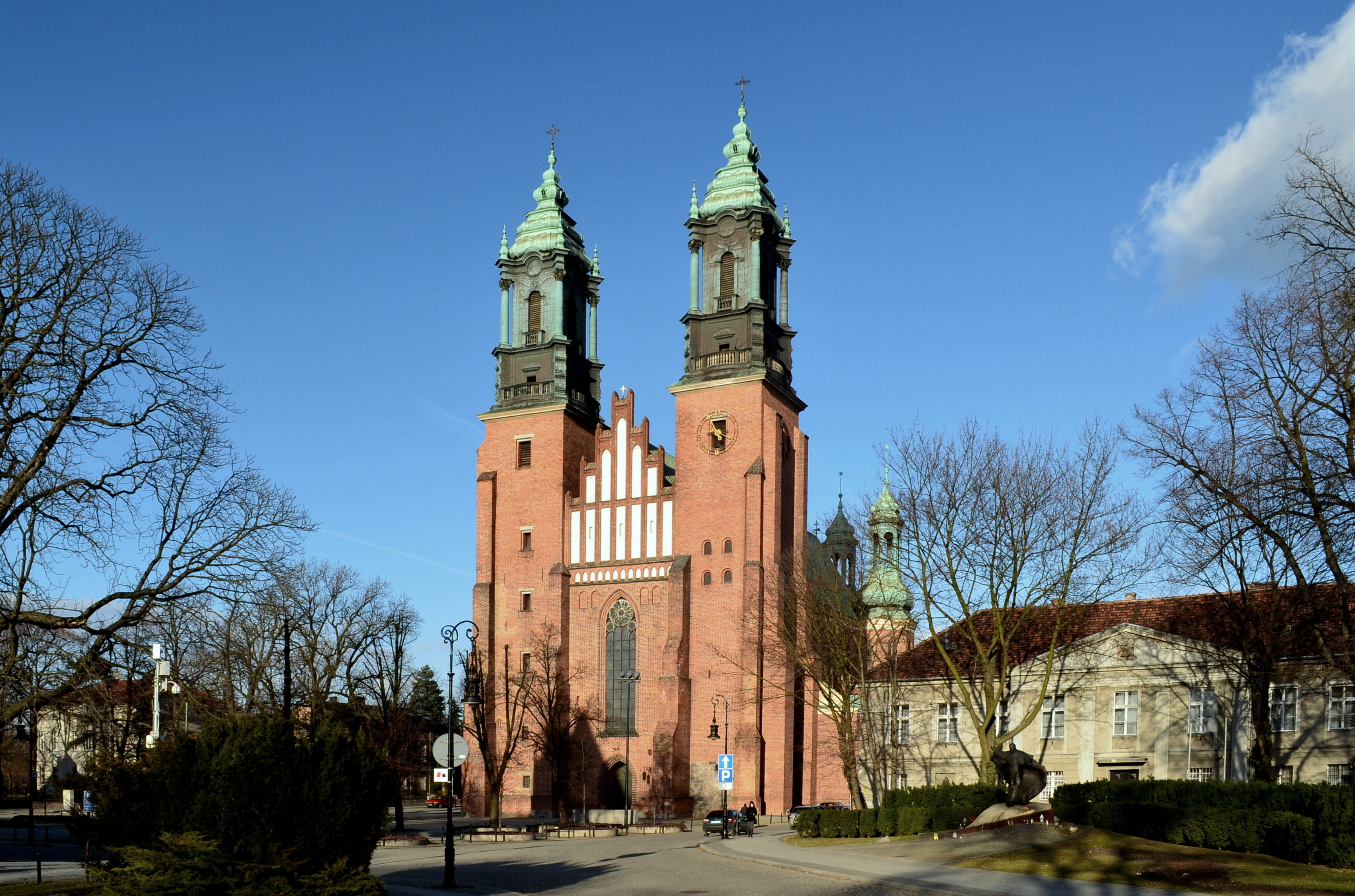 Poznań, katedra p.w. śś. Piotra i Pawła, 2 poł. XIII, XIV, XVIII, 1954-1956